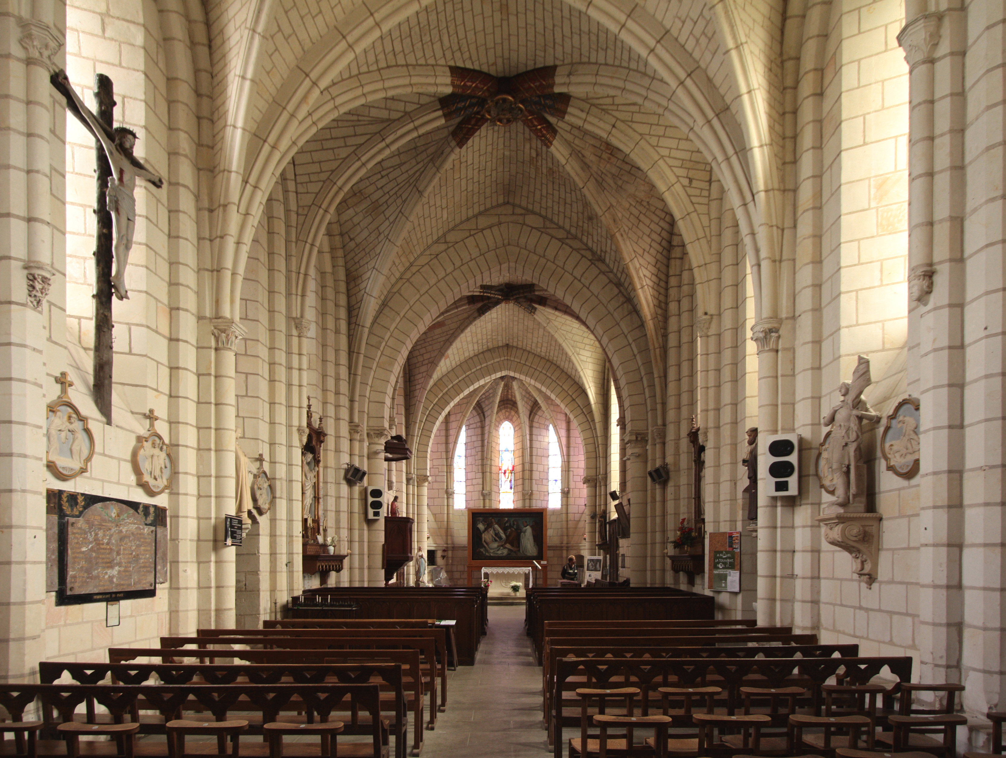 Stiftskirche Saint-Martin in der Gemeinde Nouans-les-Fontaines im Departement Indre-et-Loire/Frankreich.